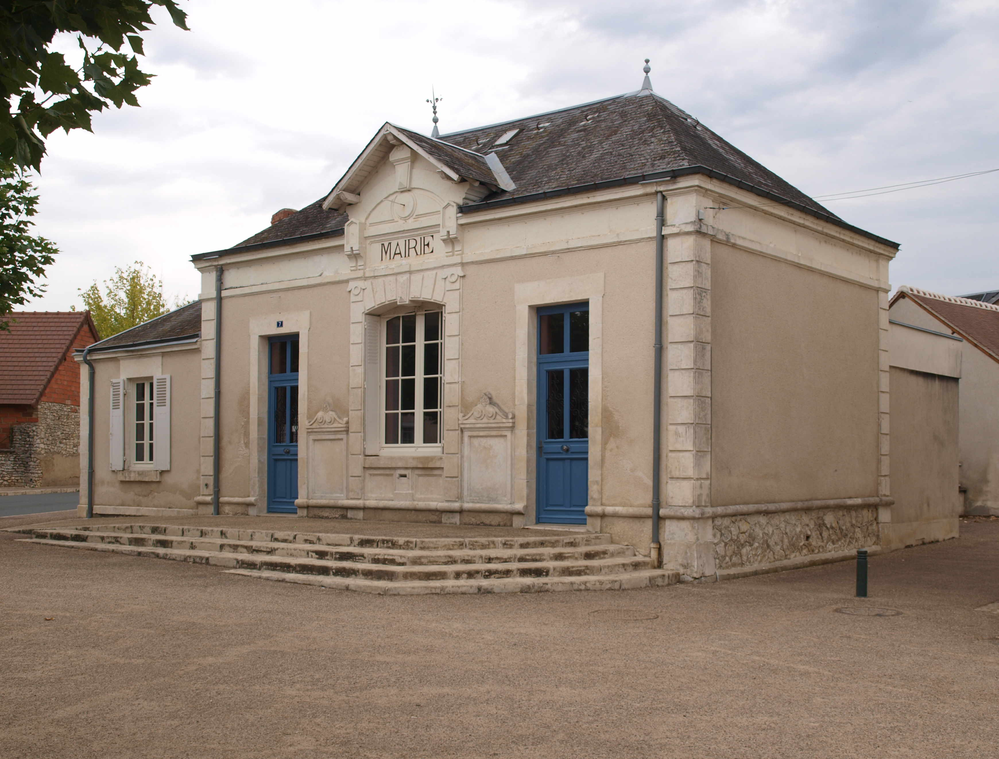 Arthon (Indre; France) ; mairie